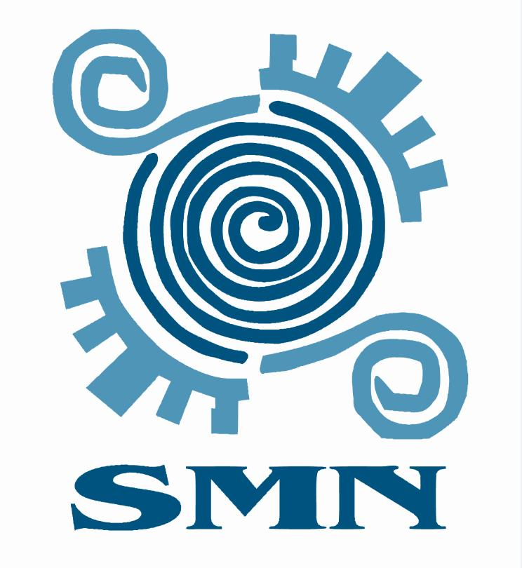 Logotipo del Servicio Meteorológico Nacional